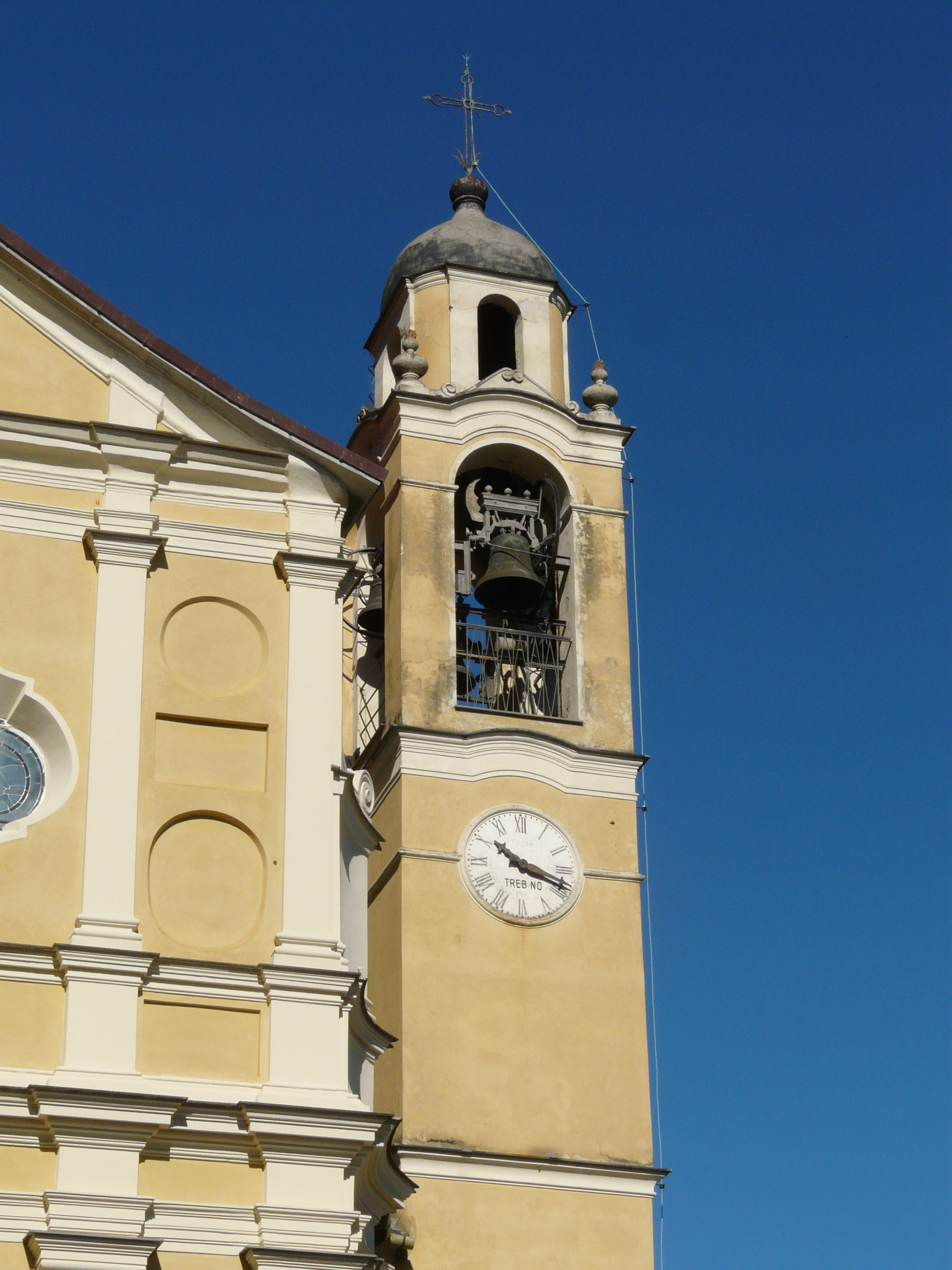 Campanile del santuario di Nostra Signora del Carmine, Nozarego, Santa Margherita Ligure, Liguria, Italia